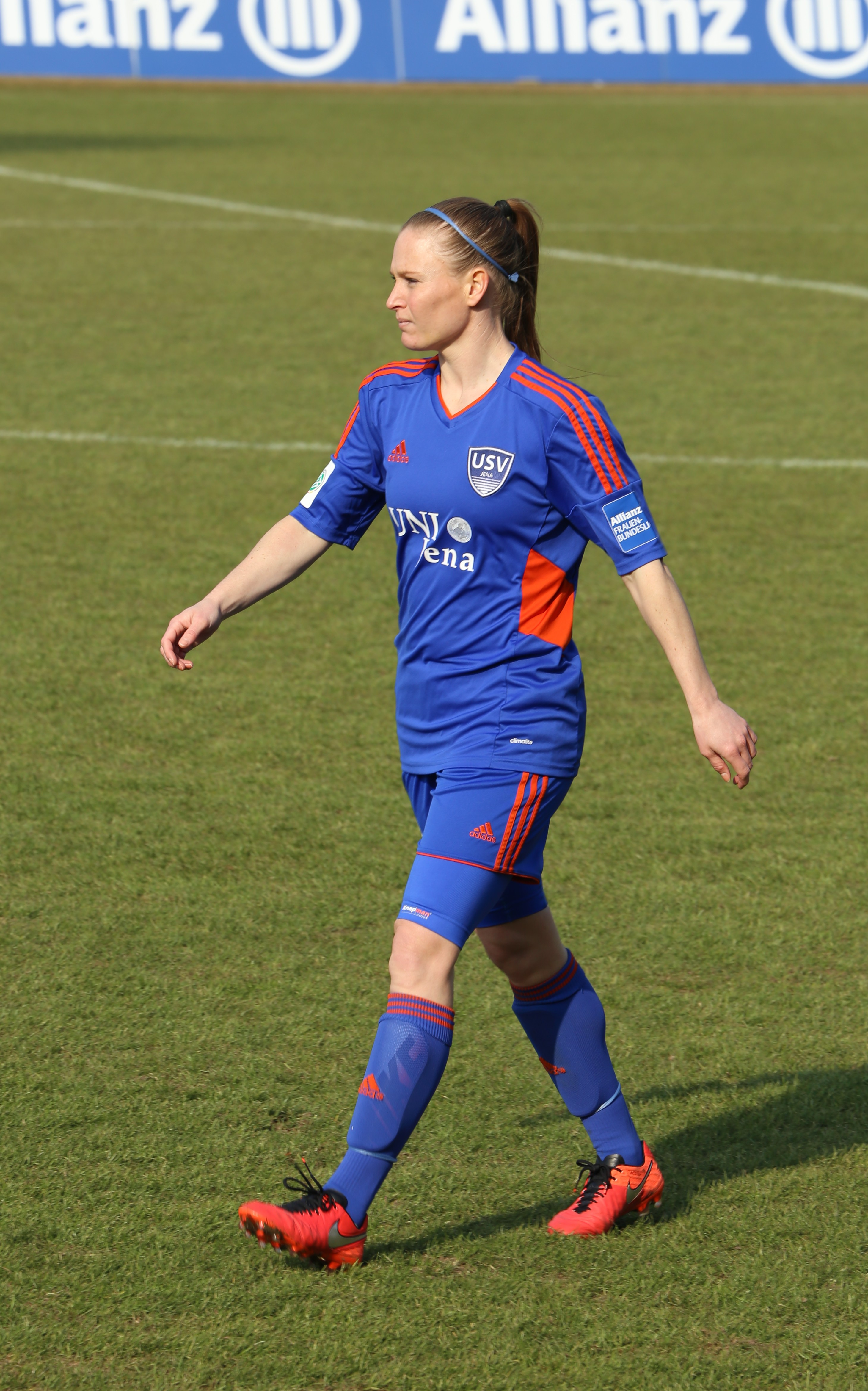 Claudia van den Heiligenberg (FF USV Jena) beim Frauen-Bundesliga-Spiel FC Bayern München gegen FF USV Jena am 19. März 2016 im Stadion an der Grünwalder Straße (Ergebnis war 5:1).